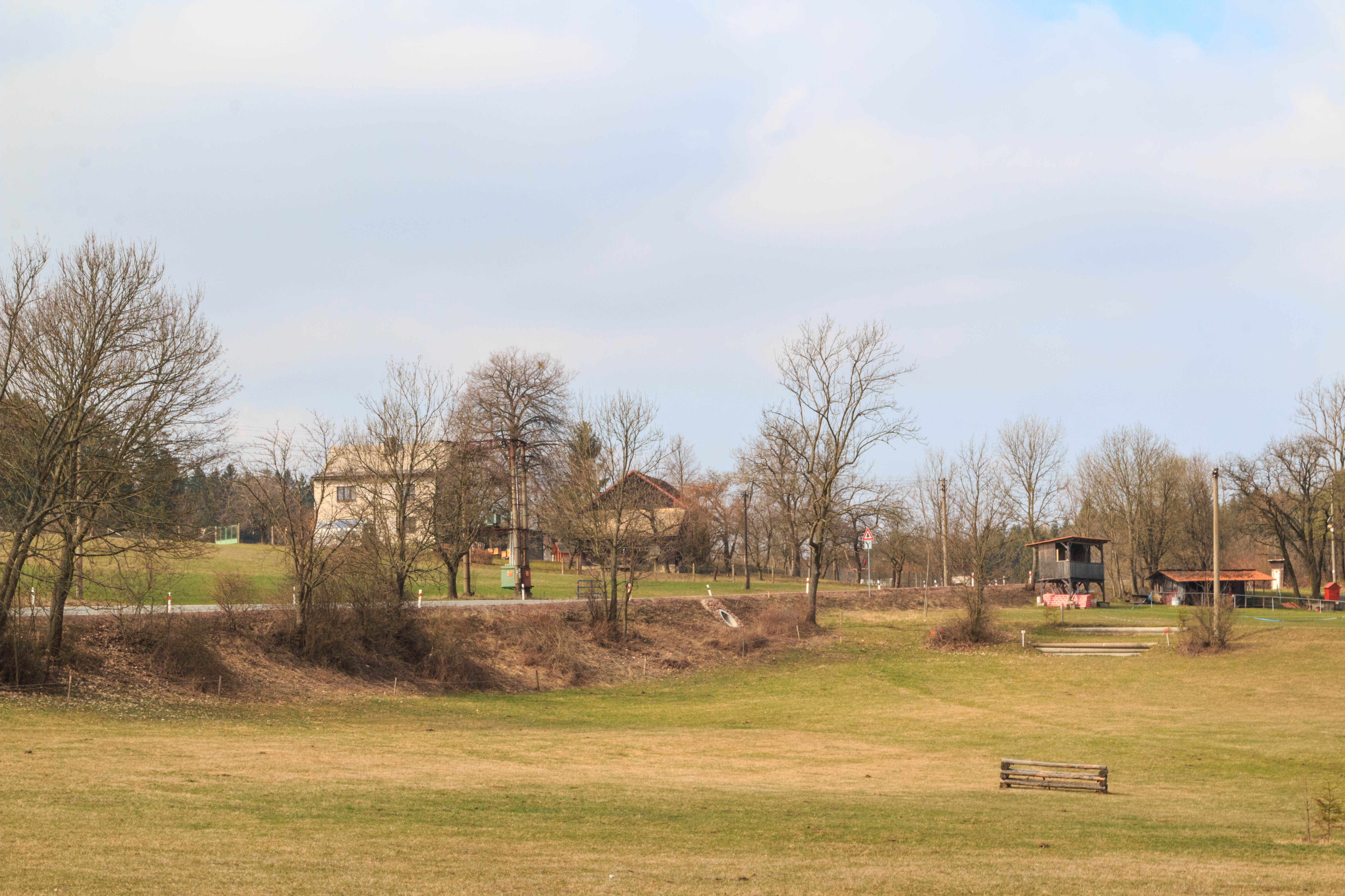 Čihadlo u Javornice - čp. 142